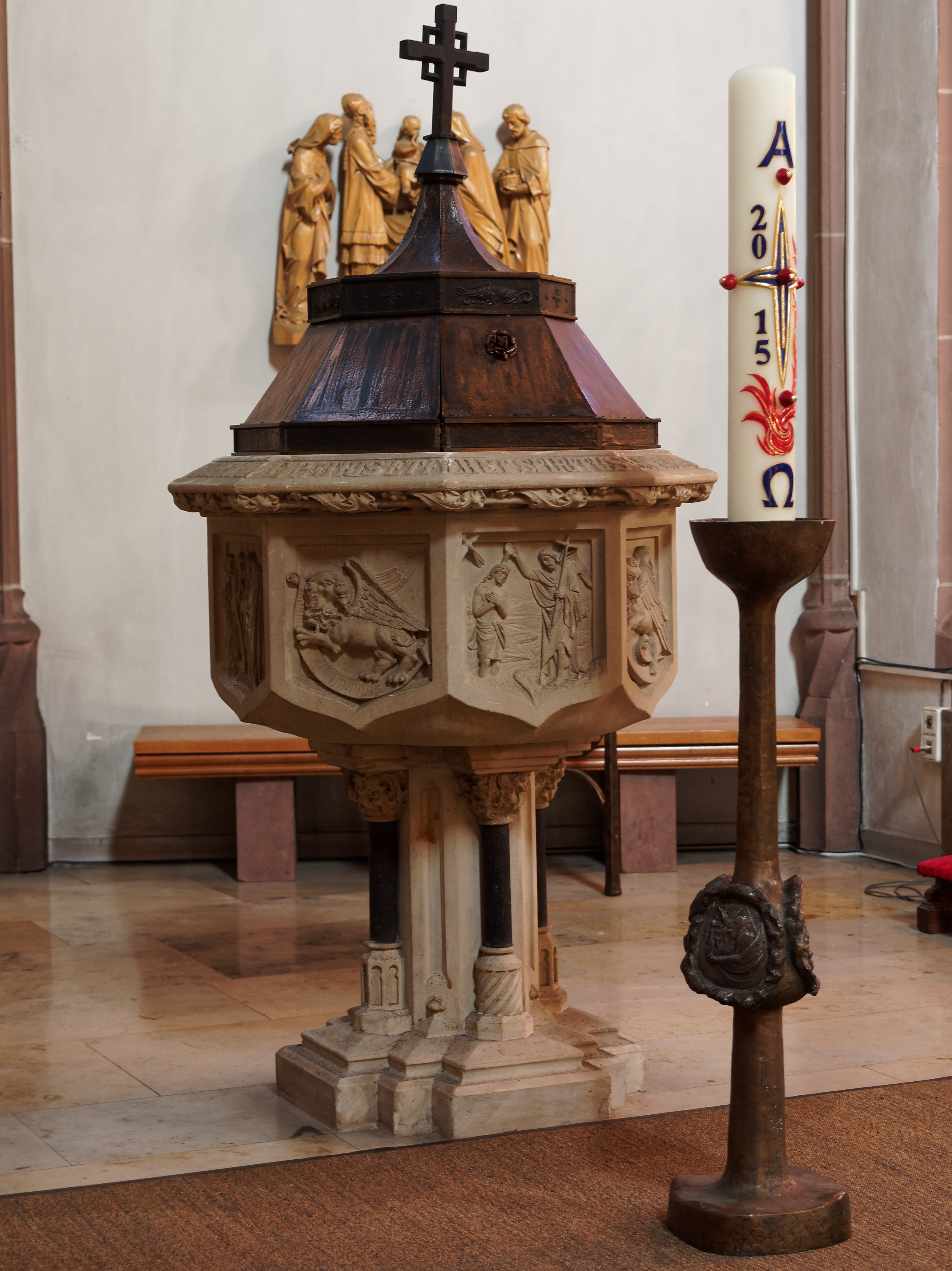 Die Herz-Jesu-Kirche in Herne-Mitte, gotisches Taufbecken